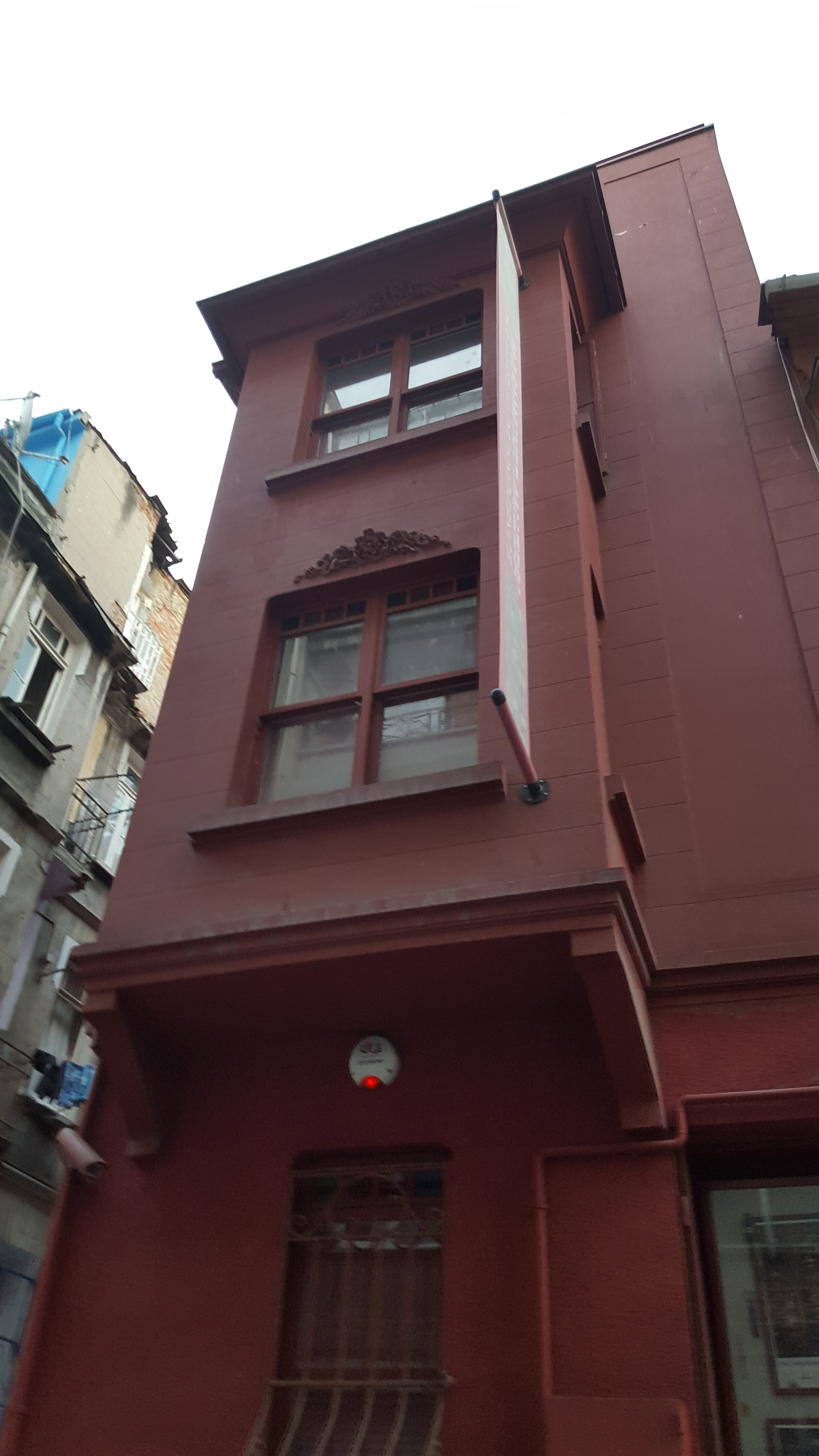 חזית מוזיאון התמימות באיסטנבול